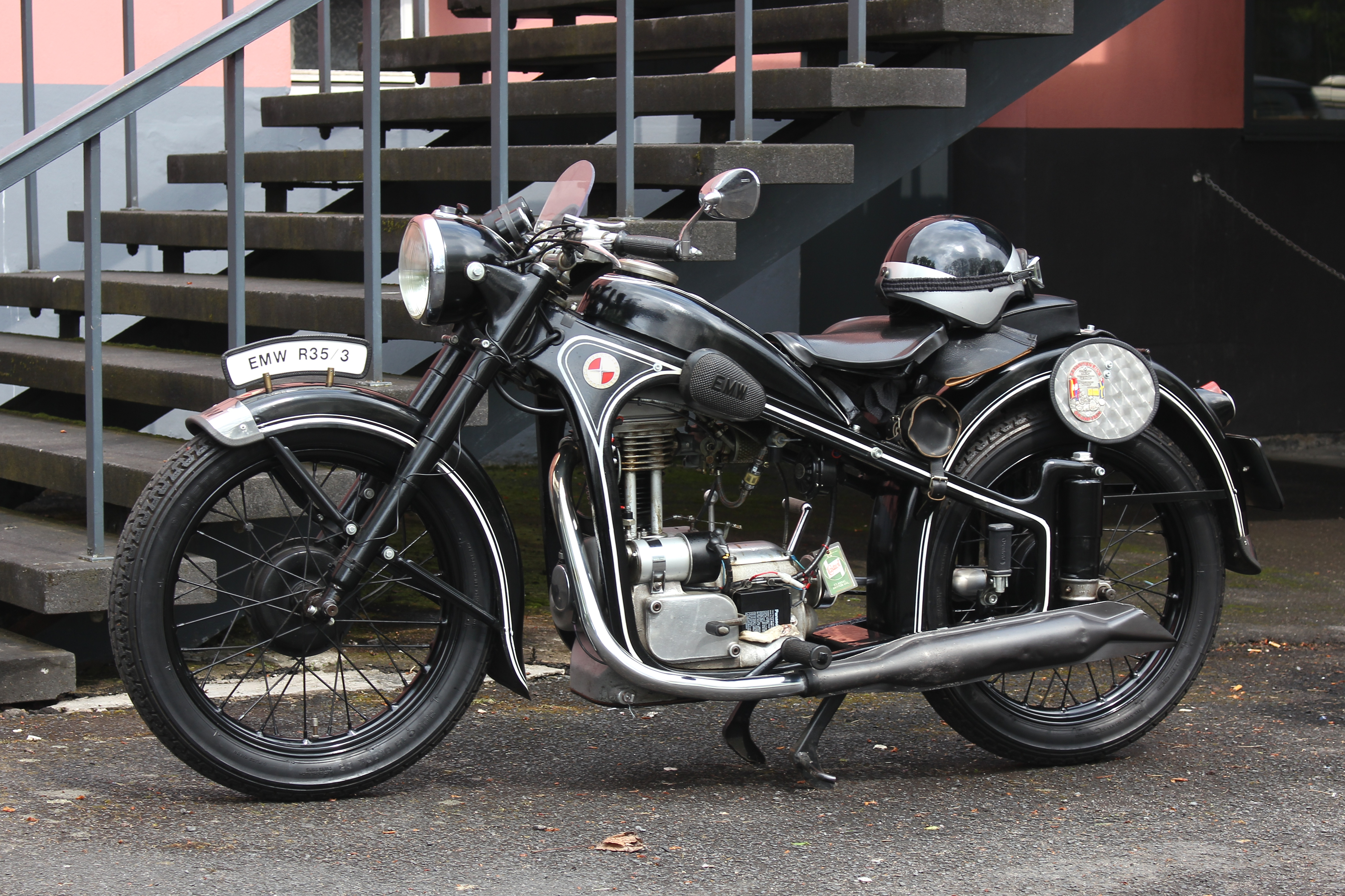 EMW R 35/3, Baujahr 1954; Einzylindermotor, 340 cm³, 14 PS